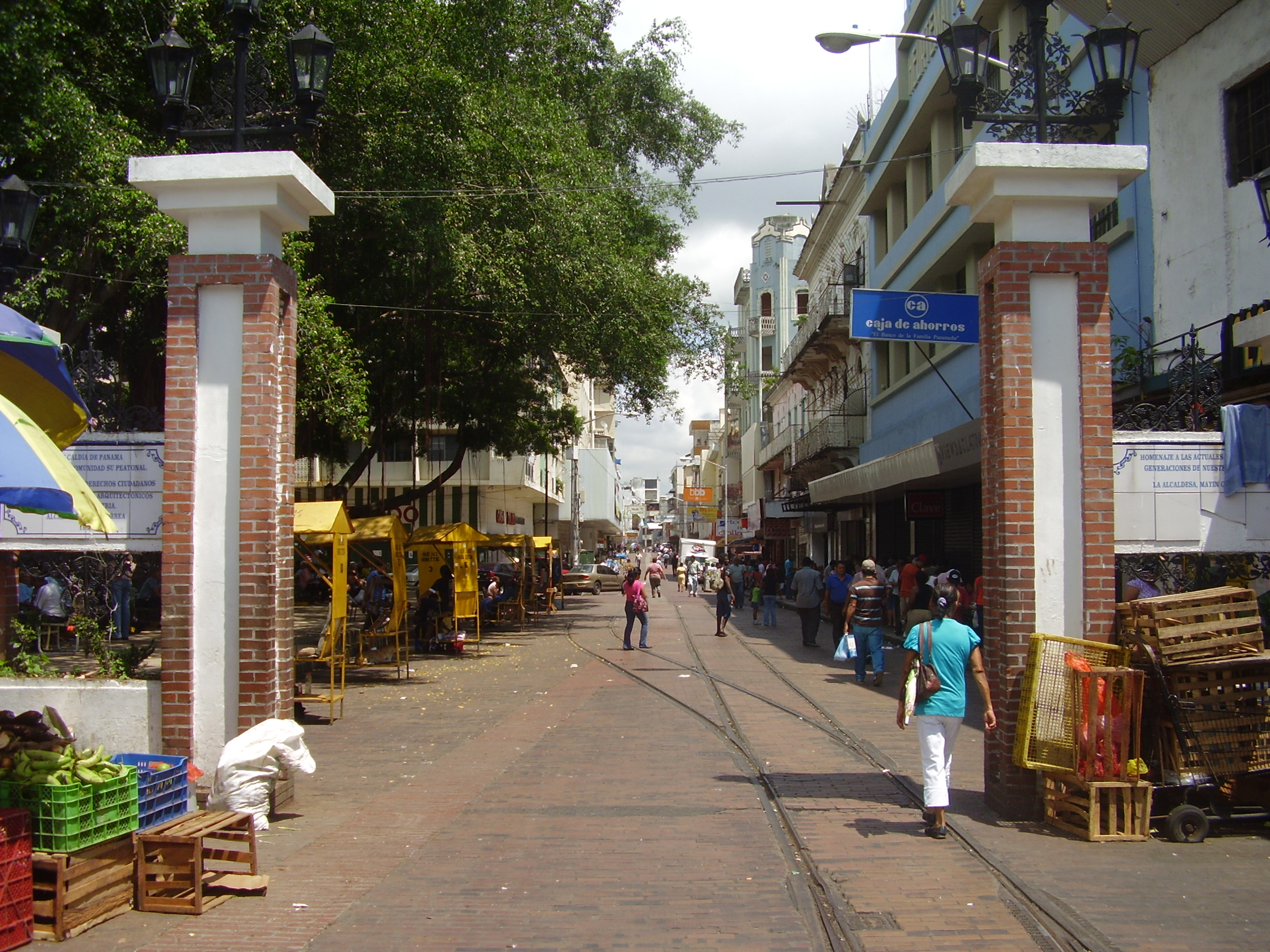 Avenida Central en Panamá (Inicio desde el Parque de Santa Ana)